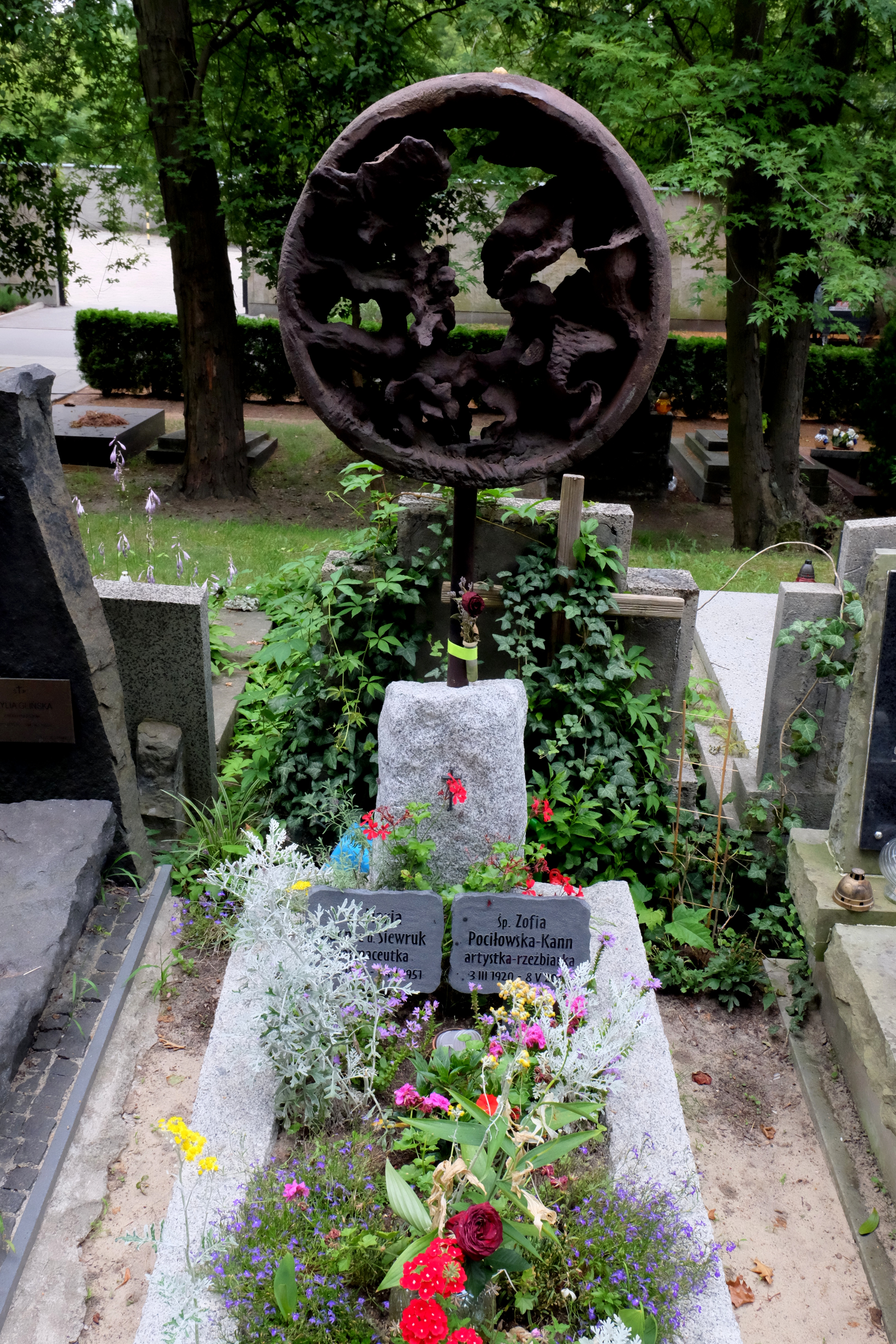 Grób rzeźbiarki Zofii Pociałkowskiej-Kann na Cmentarzu Wojskowym na Powązkach w Warszawie